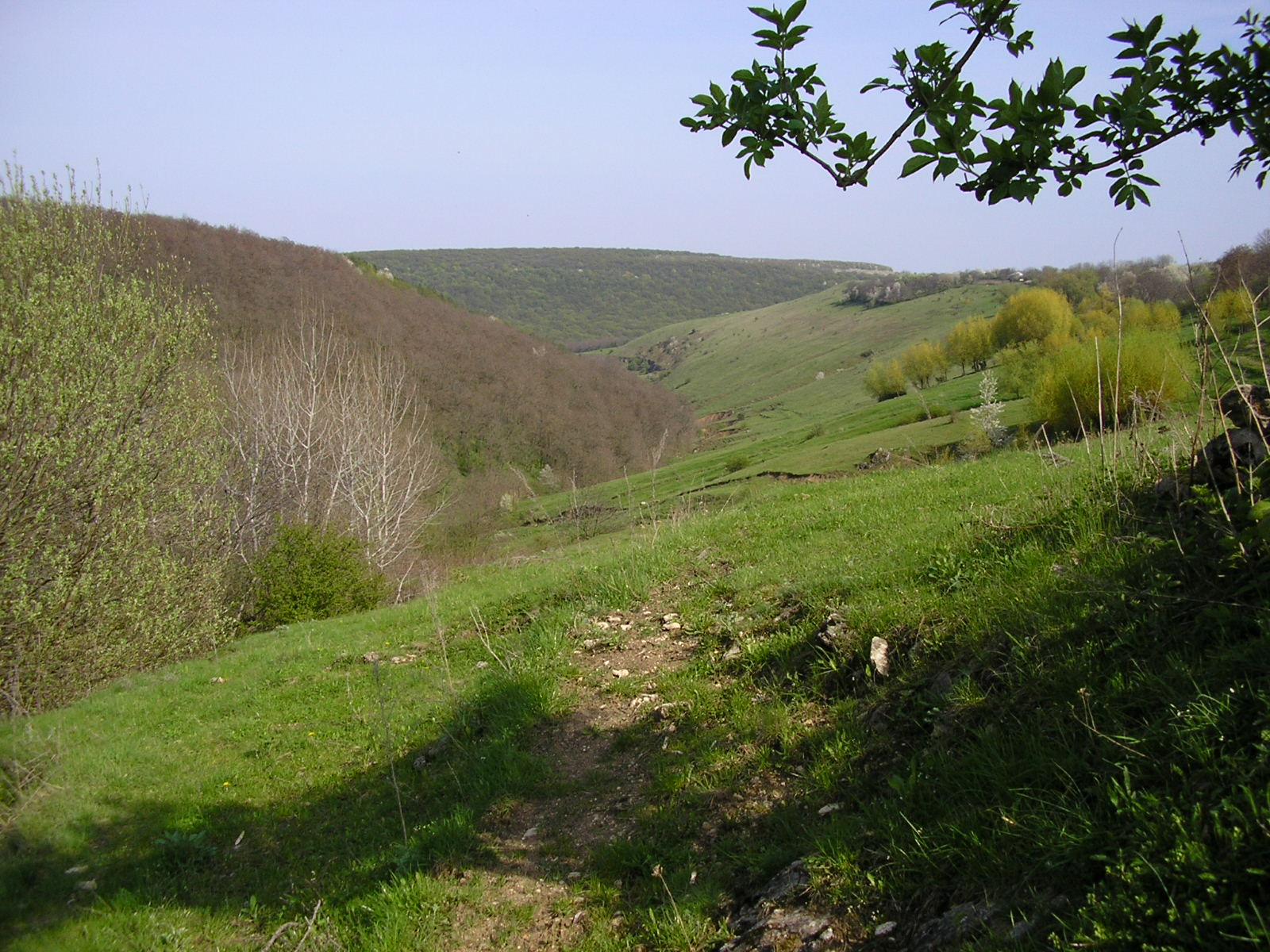 Попівський ярок. Північна околиця с. Рудківці Новоушицького району.